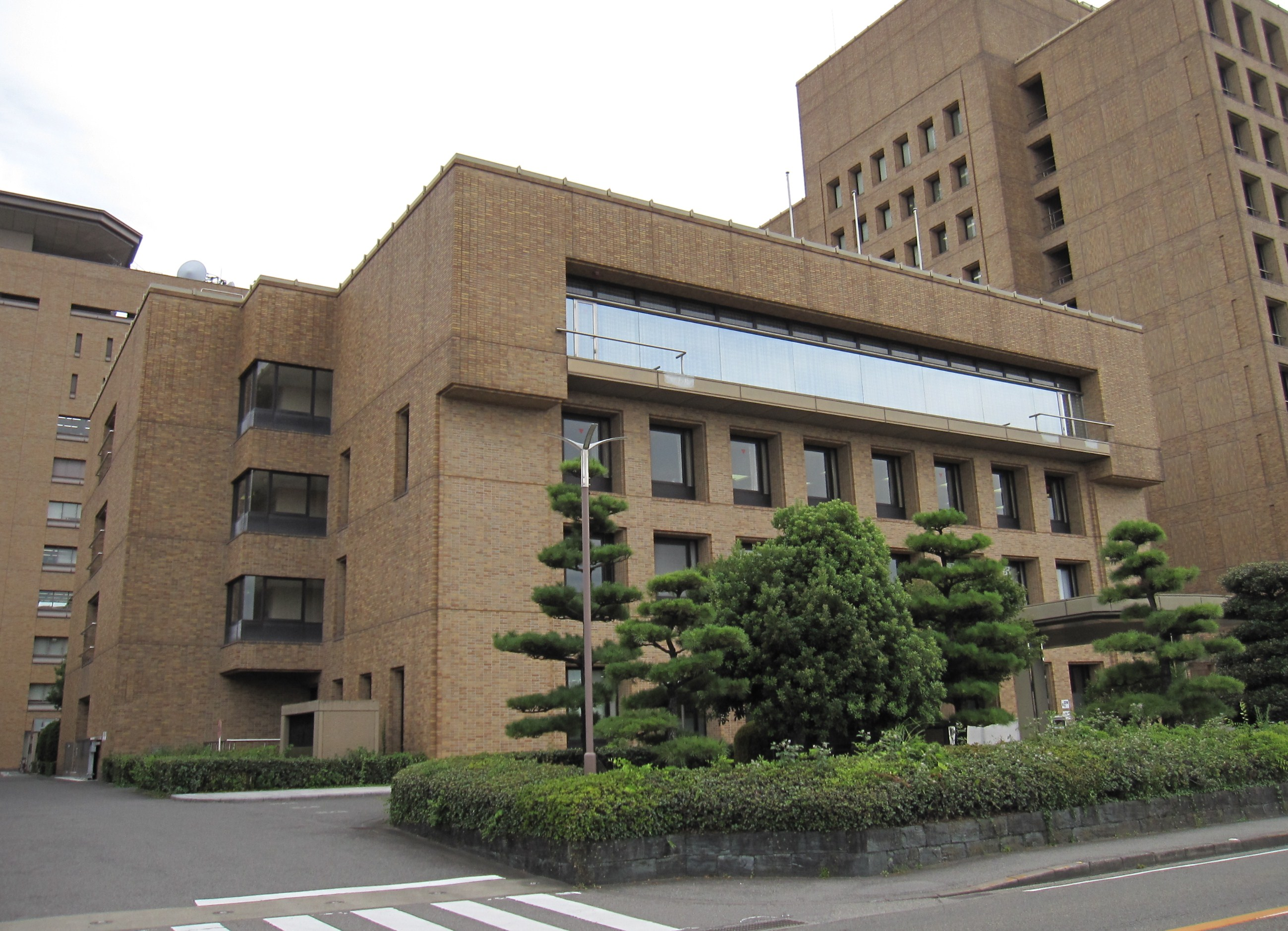 徳島県議会議事堂